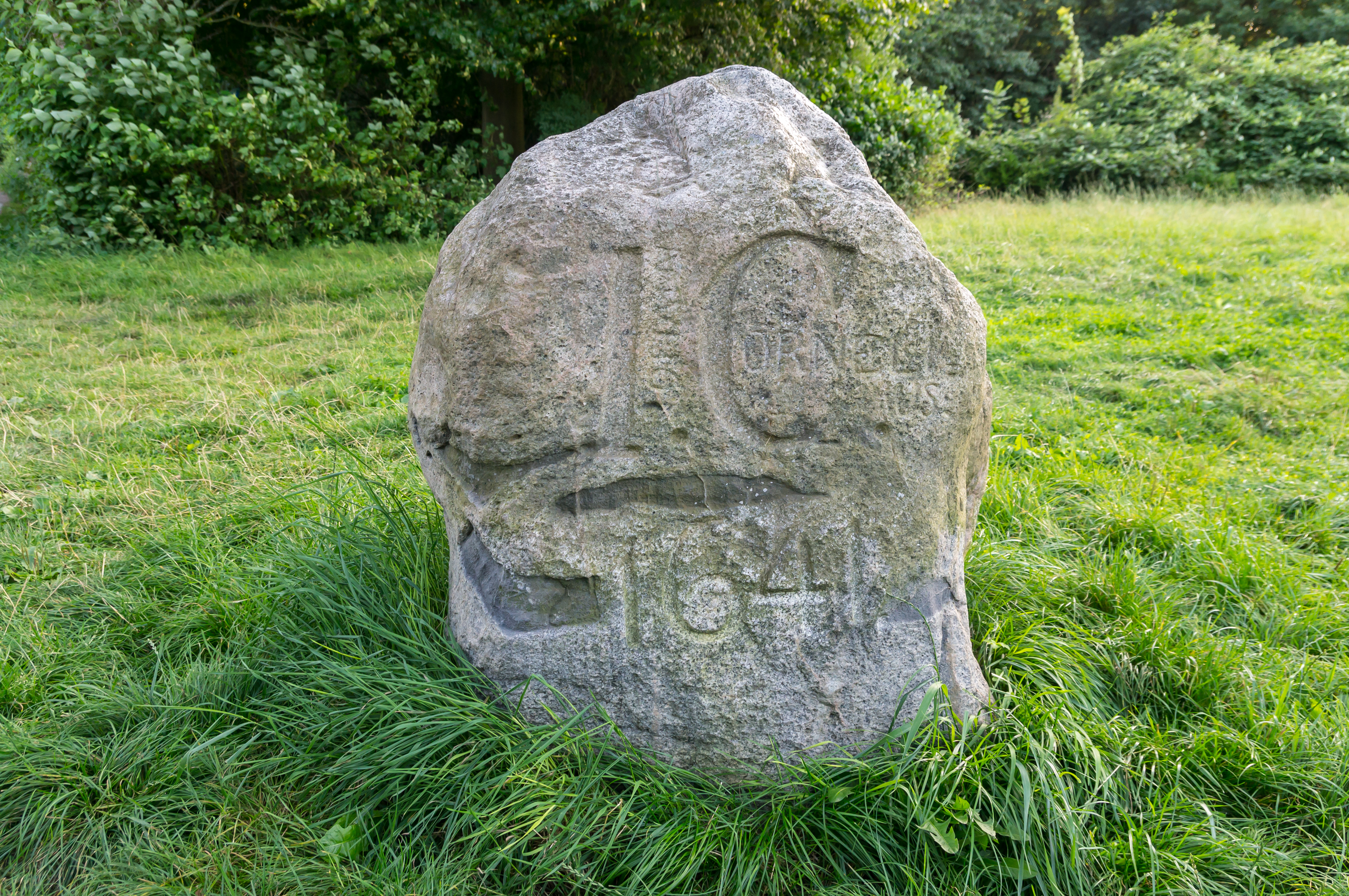 Flensburg-Fruerlund; Stein des Johann Cornelius 1641; soll der Begründer des Mürwiker Parks gewesen sein